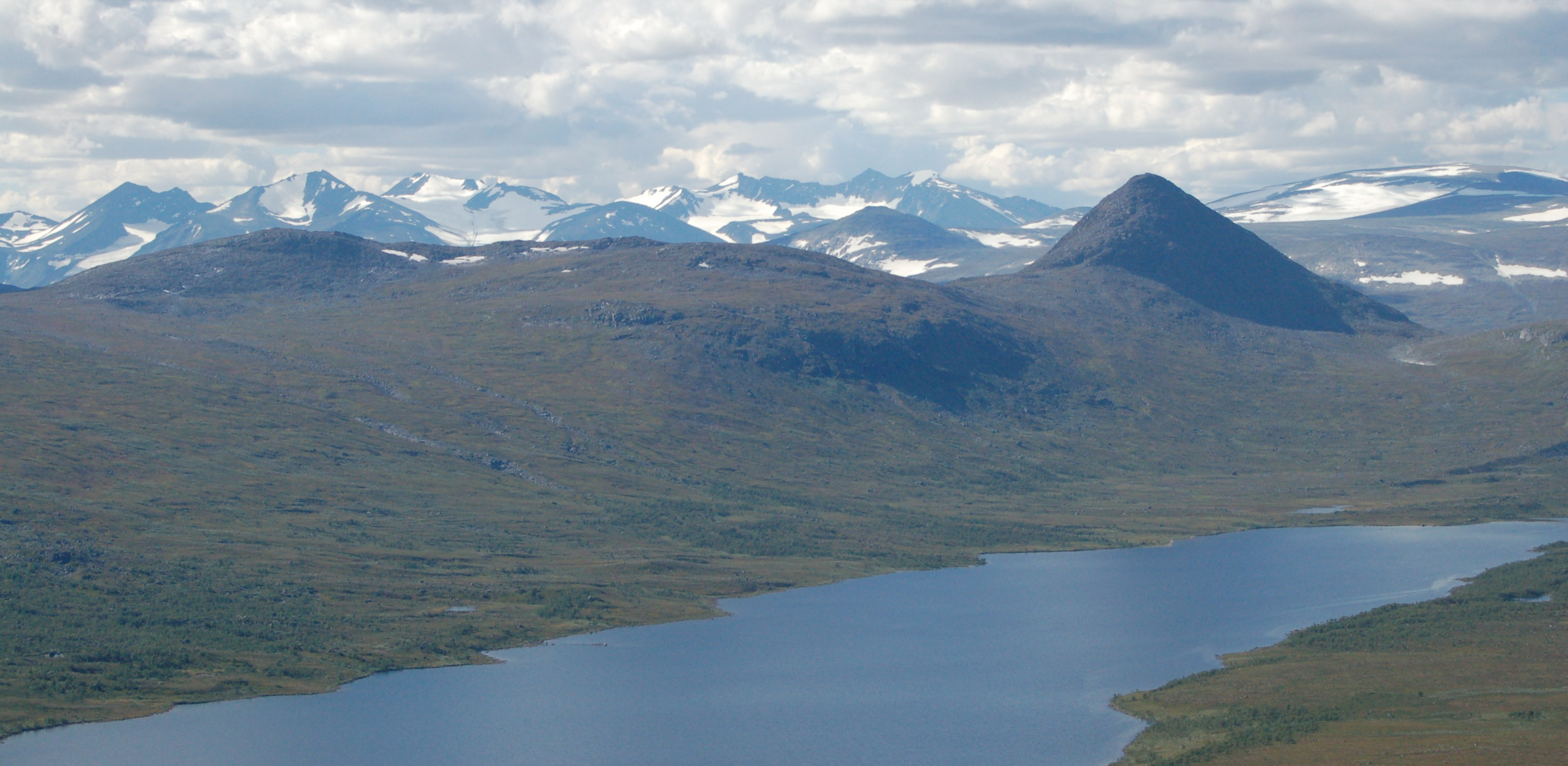 Bilden är tagen från toppen på Kierkau mot Sarek som är ett populärt vandringsmål för besökare från Saltoluokta